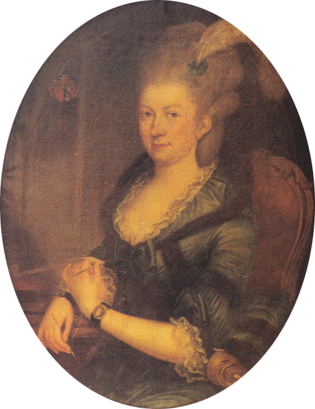 Louise Auguste von Gemmingen, geb. St. André († 1815), Frau von Ludwig Eberhard von Gemmingen (1750–1841)